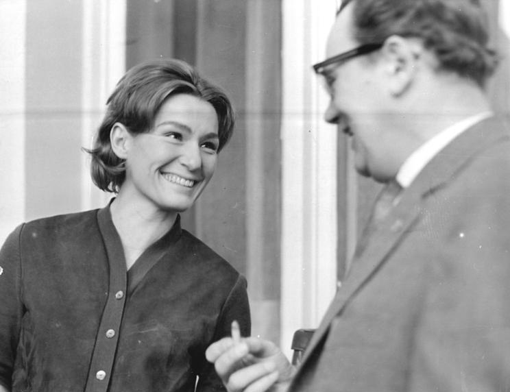 Zentralbild Zühlsdorf 23.1.1960 Konferenz der Schauspielbühnen in Berlin. Am 22.1.1960 wurde im Kulturhaus "Erich Weinert" des Kabelwerkes Oberspree in Berlin die vom Ministerium für Kultur einberufene dreitägige Konferenz der Schauspielbühnen der DDR eröffnet. Auf der Konferenz wird über die Aufgaben der Theater im Siebenjahrplan beraten. UBz: Die Schauspielerin Inge Keller (links) und der Schauspieler Albert Hetterle (Maxim-Gorki-Theater) im Gespräch.